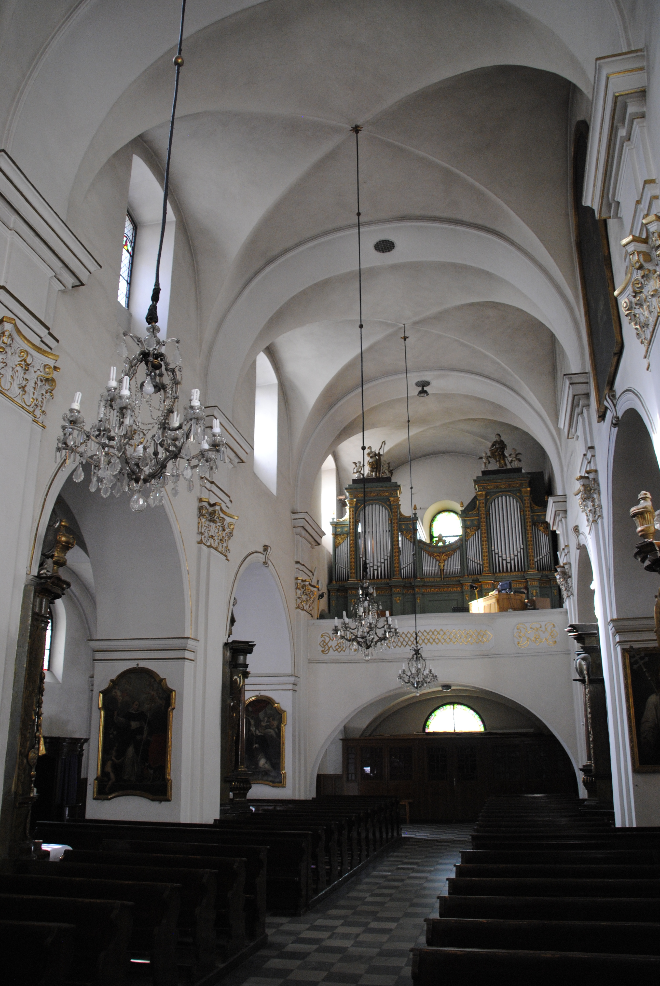 Innenraum der Kirche zur Schmerzhaften Muttergottes in Opole (Oppeln). Blick zur Orgel